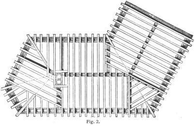 Balkenlage für einen unregelmäßigen Geundriss